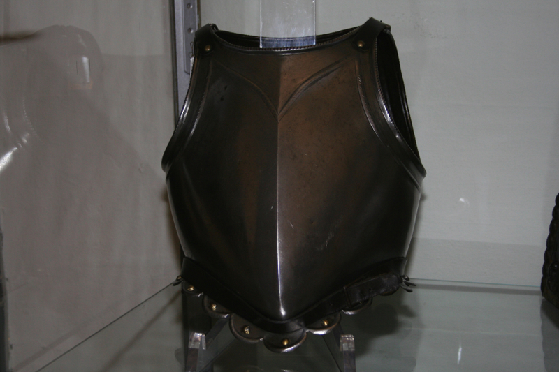 Armatura per bambino, XVI sec., Palazzo Duranti-Marzoli, Palazzolo sull'Oglio.